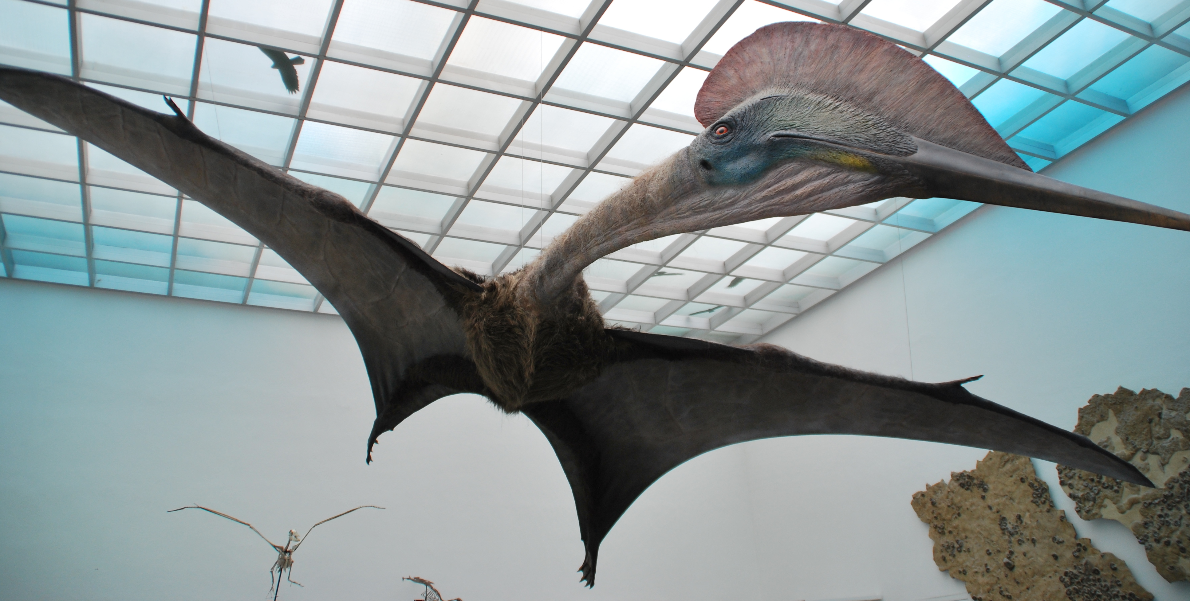 Staatliches Museum für Naturkunde Karlsruhe. by: quagga.cat